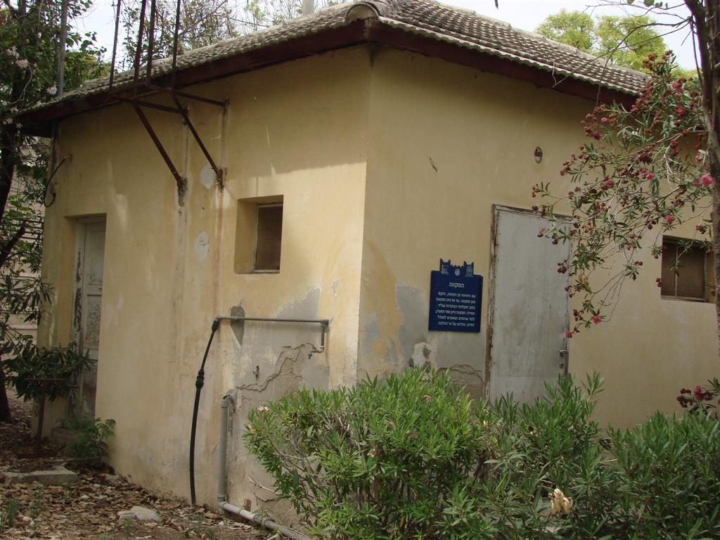 המקווה בטירת צבי 2